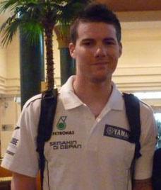 Yamaha rider Ben Spies in Kuala Lumpur after end MotoGP 2011 test